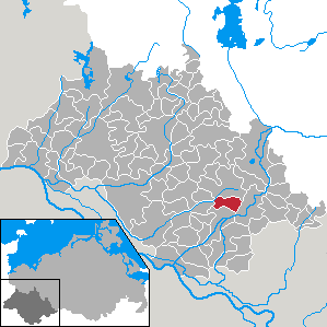 Karstädt (Mecklenburg)Karstädt in Mecklenburg-Vorpommern - district Ludwigslust